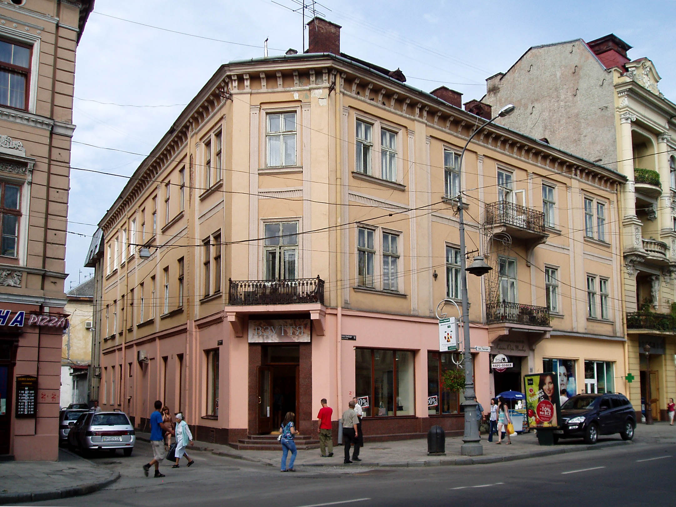 Будинок № 33 на проспекті Свободи у Львові.